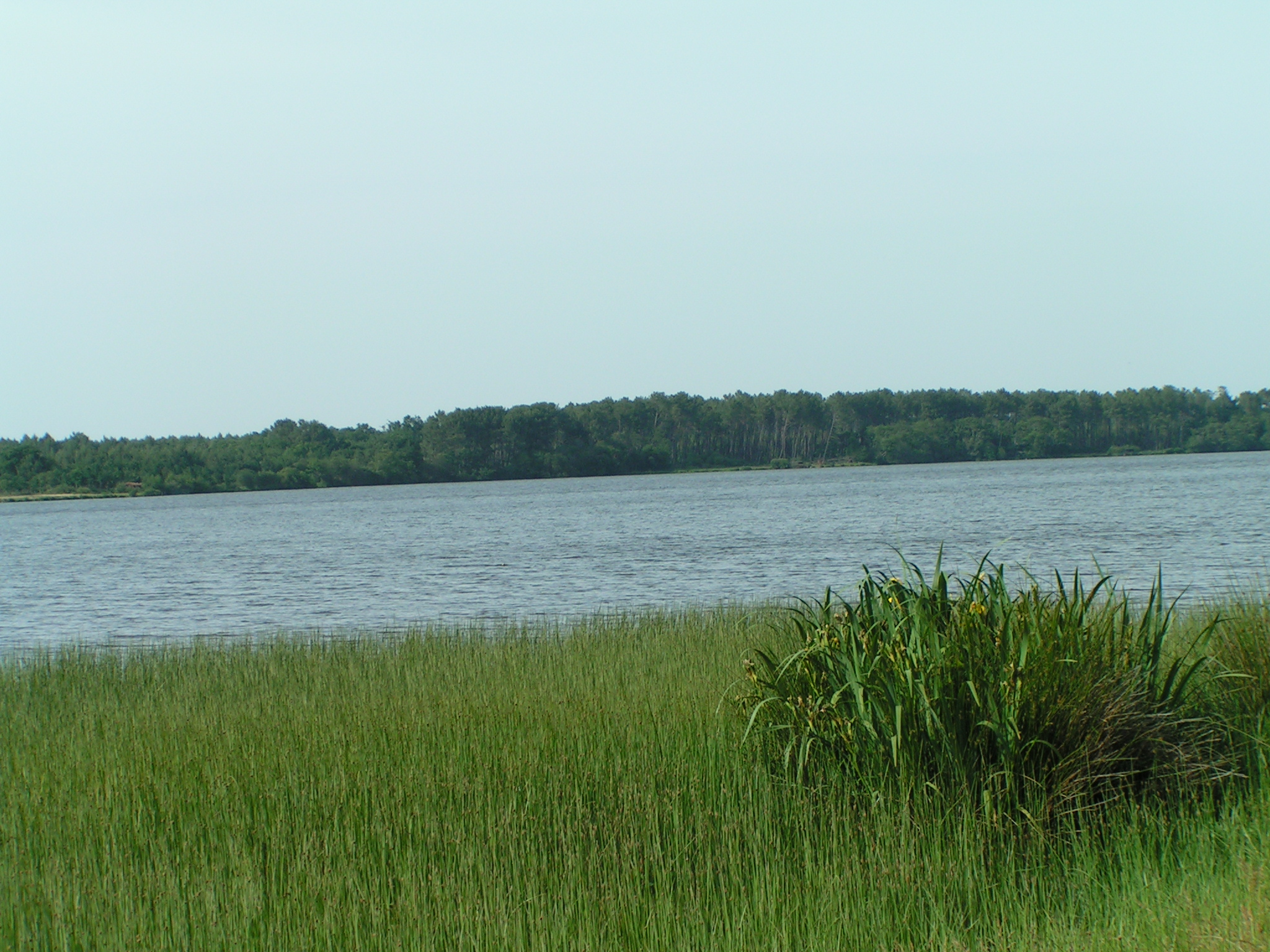 Étang d'Aureilhan, Image personnelle